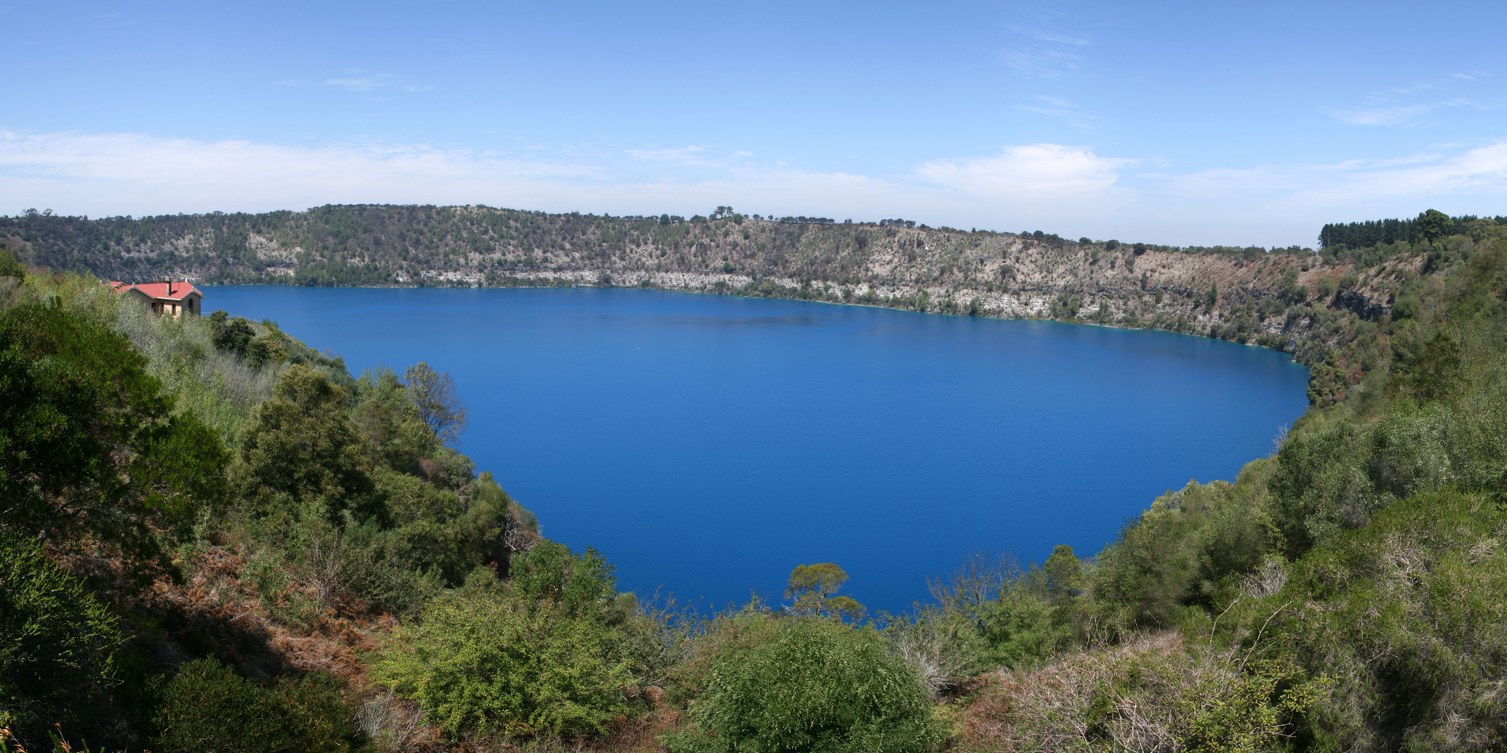 Blue Lake, Mount Gambier, Australia